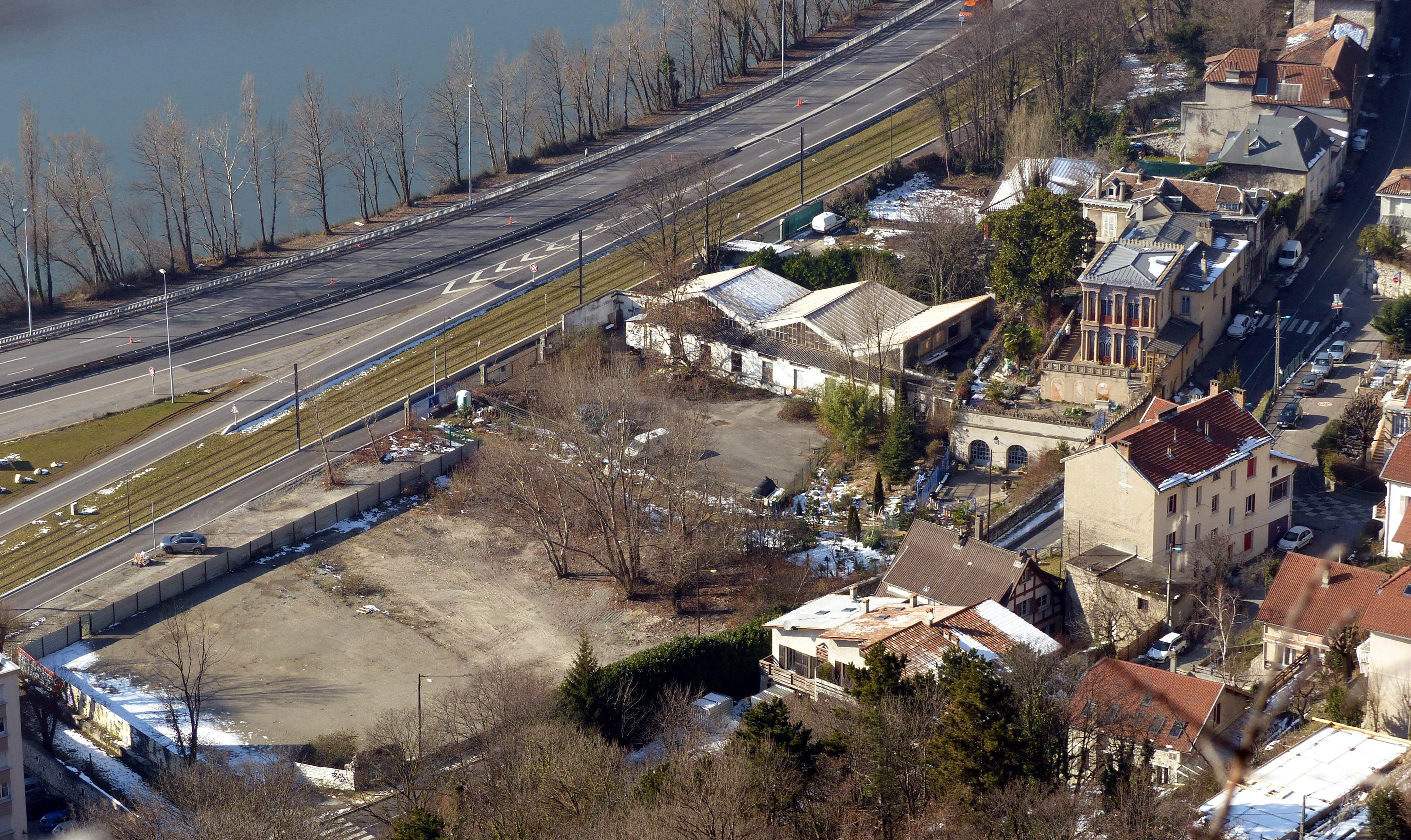 La Casamaures, Saint-Martin-le-Vinoux, France.